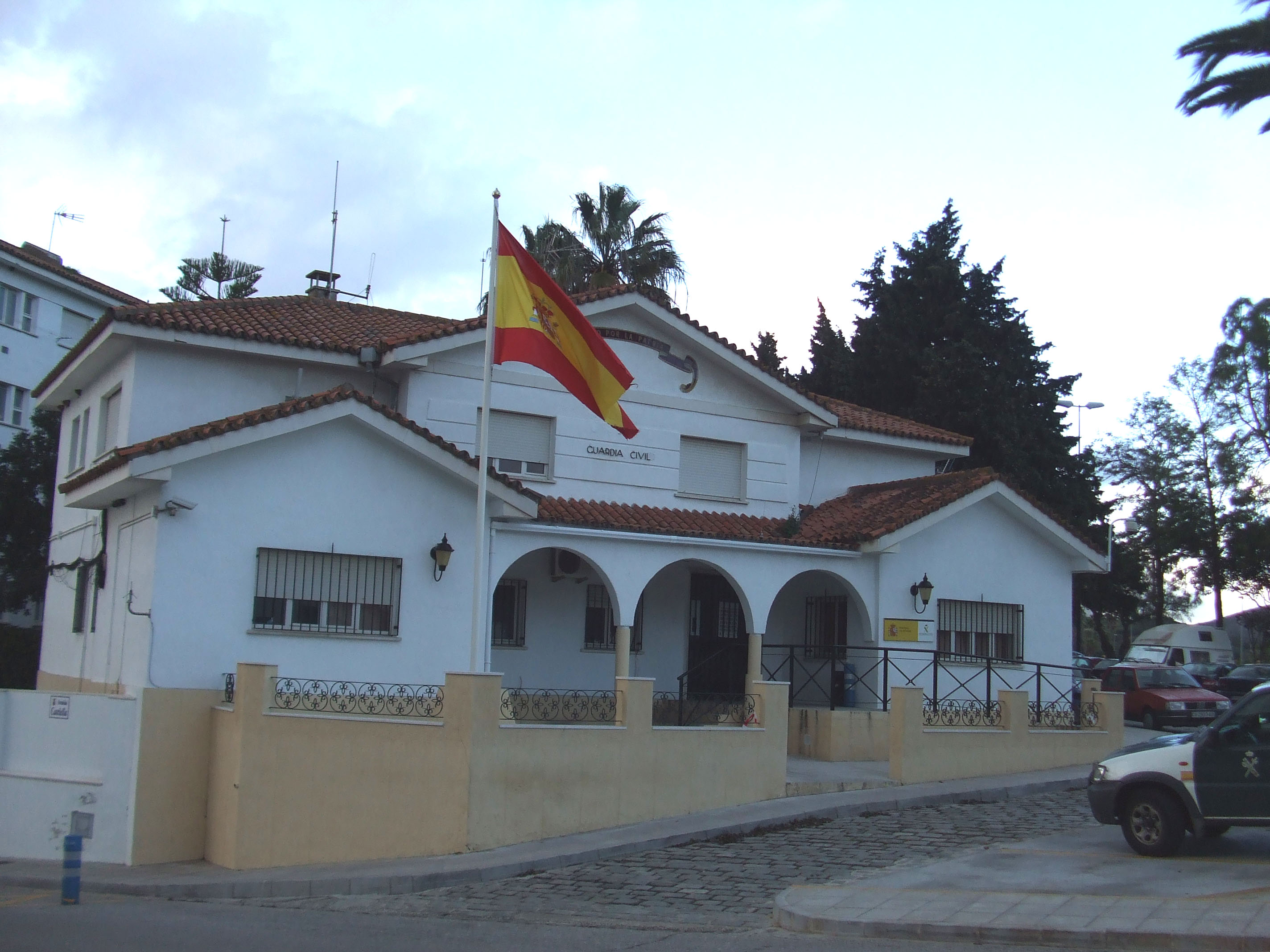 Casa Cuartel de la Guardia Civil de San Roque, situada en la Avenida Castiella, número 2, junto al Parque Cuatro Vientos.